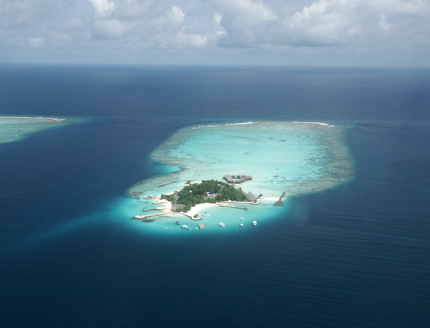 Bolifushi